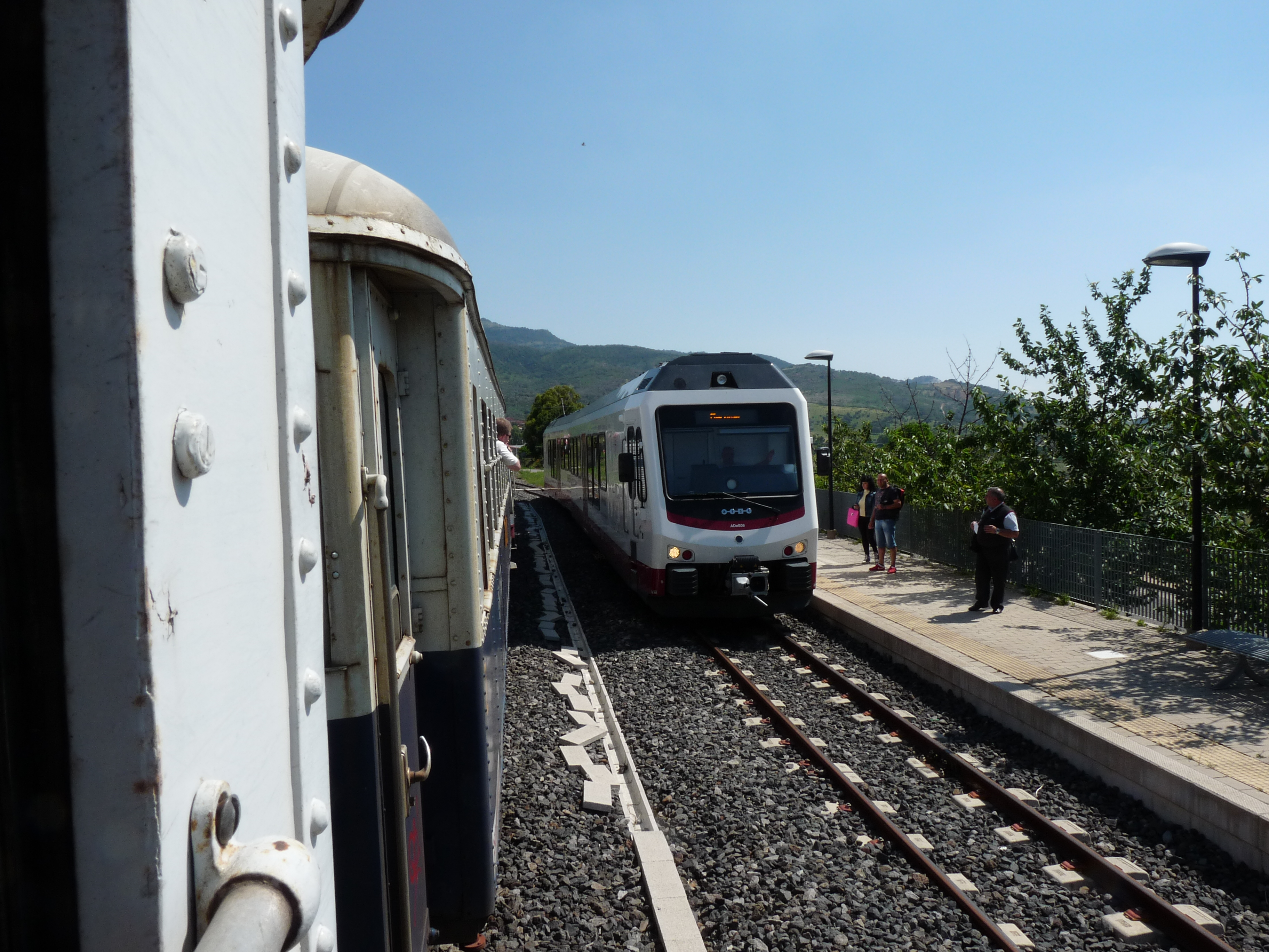 Een excursietrein tussen Macomer en Nuoro